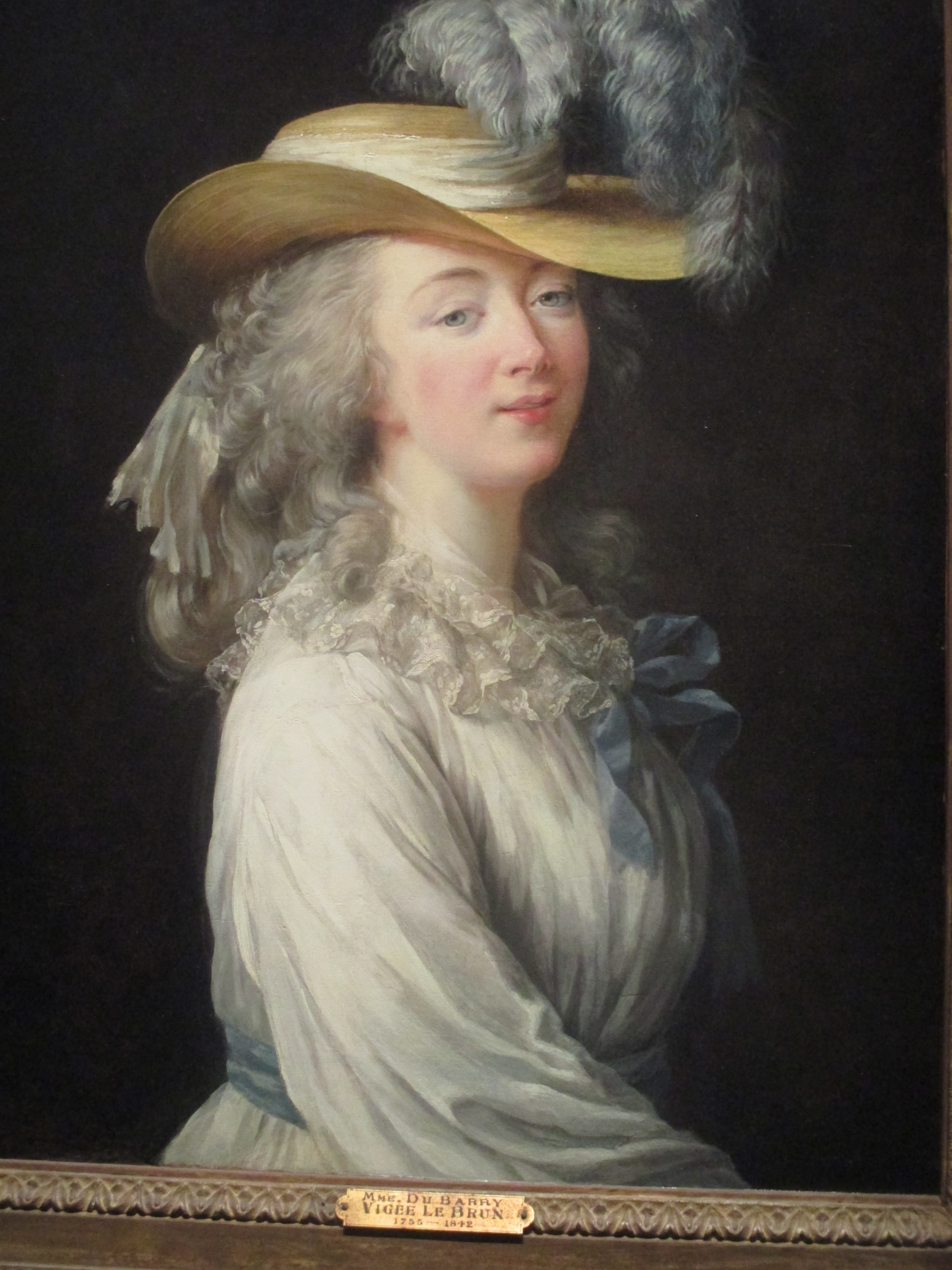 Portrait de Mme du Barry par Élisabeth Vigée Le Brun (1781). HST 69,2 X 51,4.